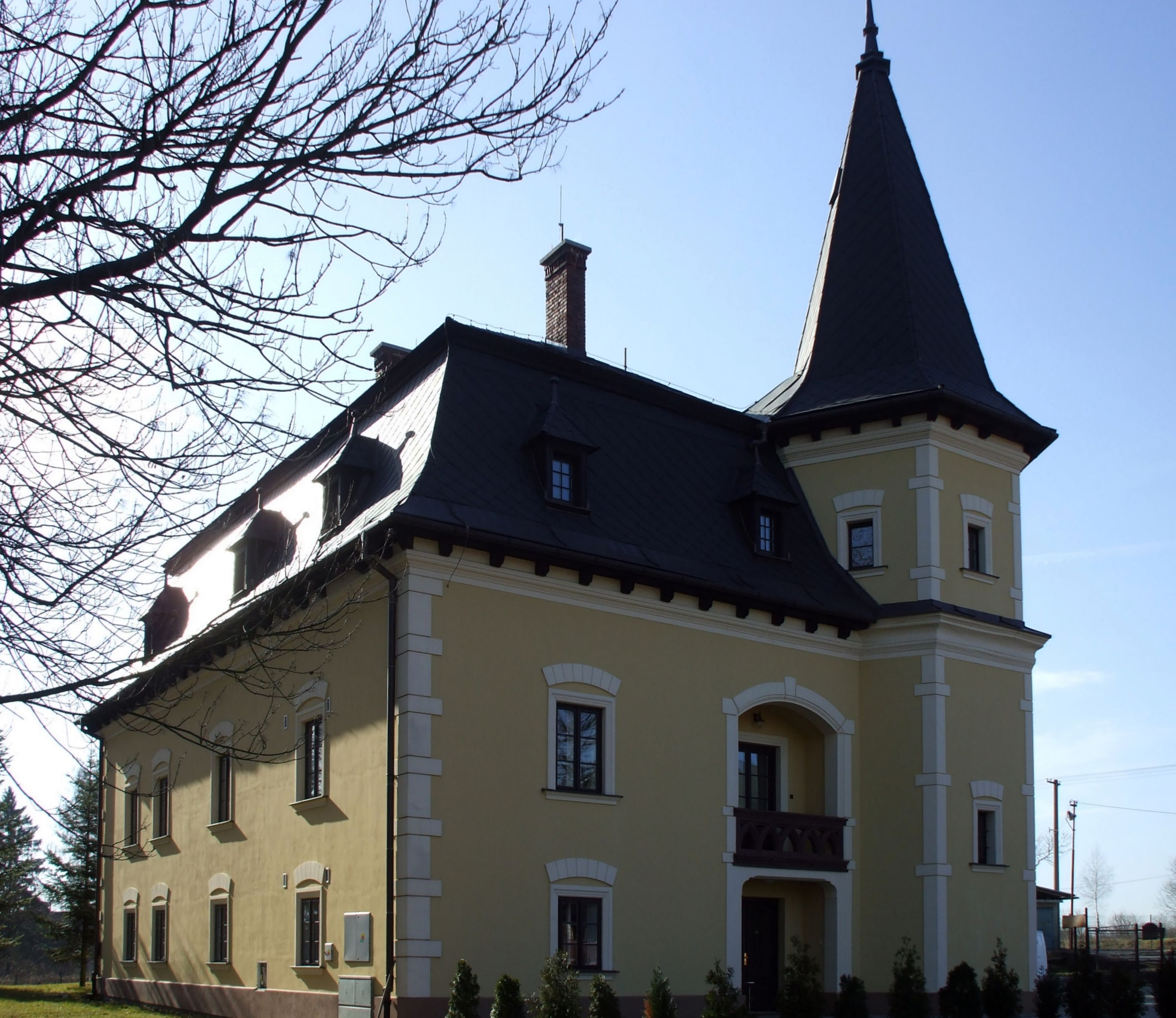 kaštieľ Záturčie This medium shows the protected monument with the number 506-11426/1 in the Slovak Republic.